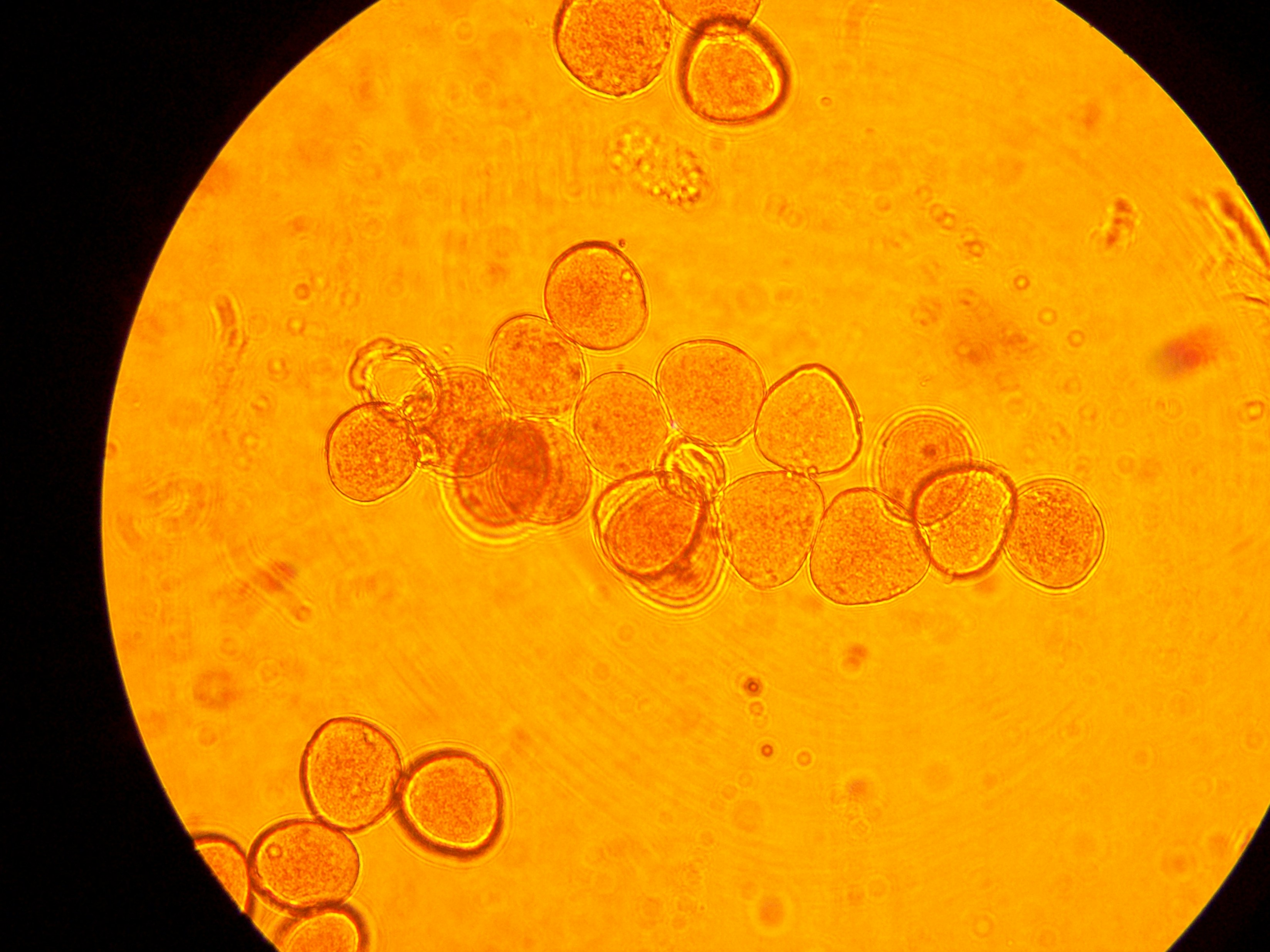 Яблоня